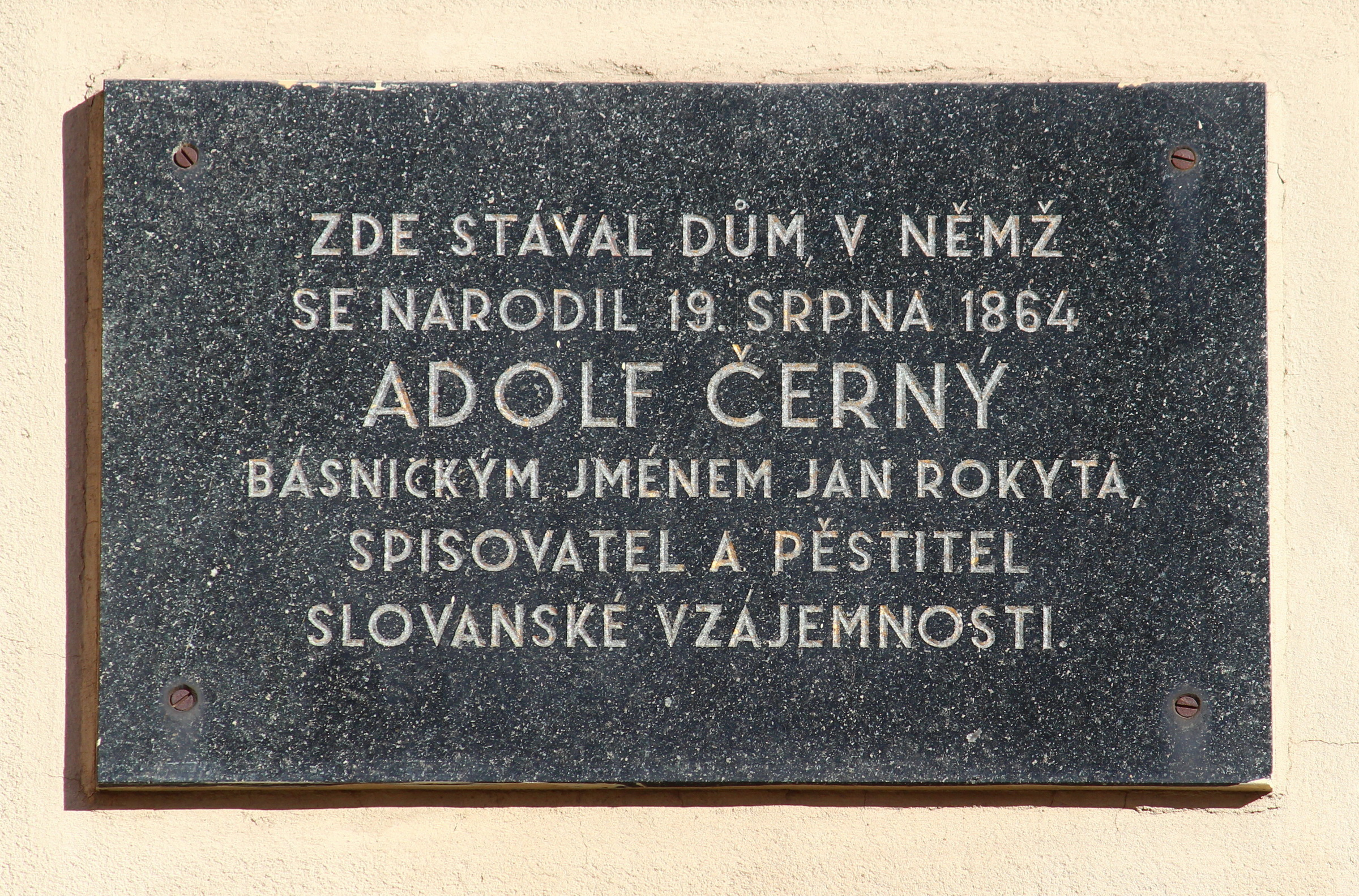 Hradec Králové, Kavčí plácek č. p. 121, "Husův dům" This photograph was taken with a DSLR from WMCZ's Camera grant.